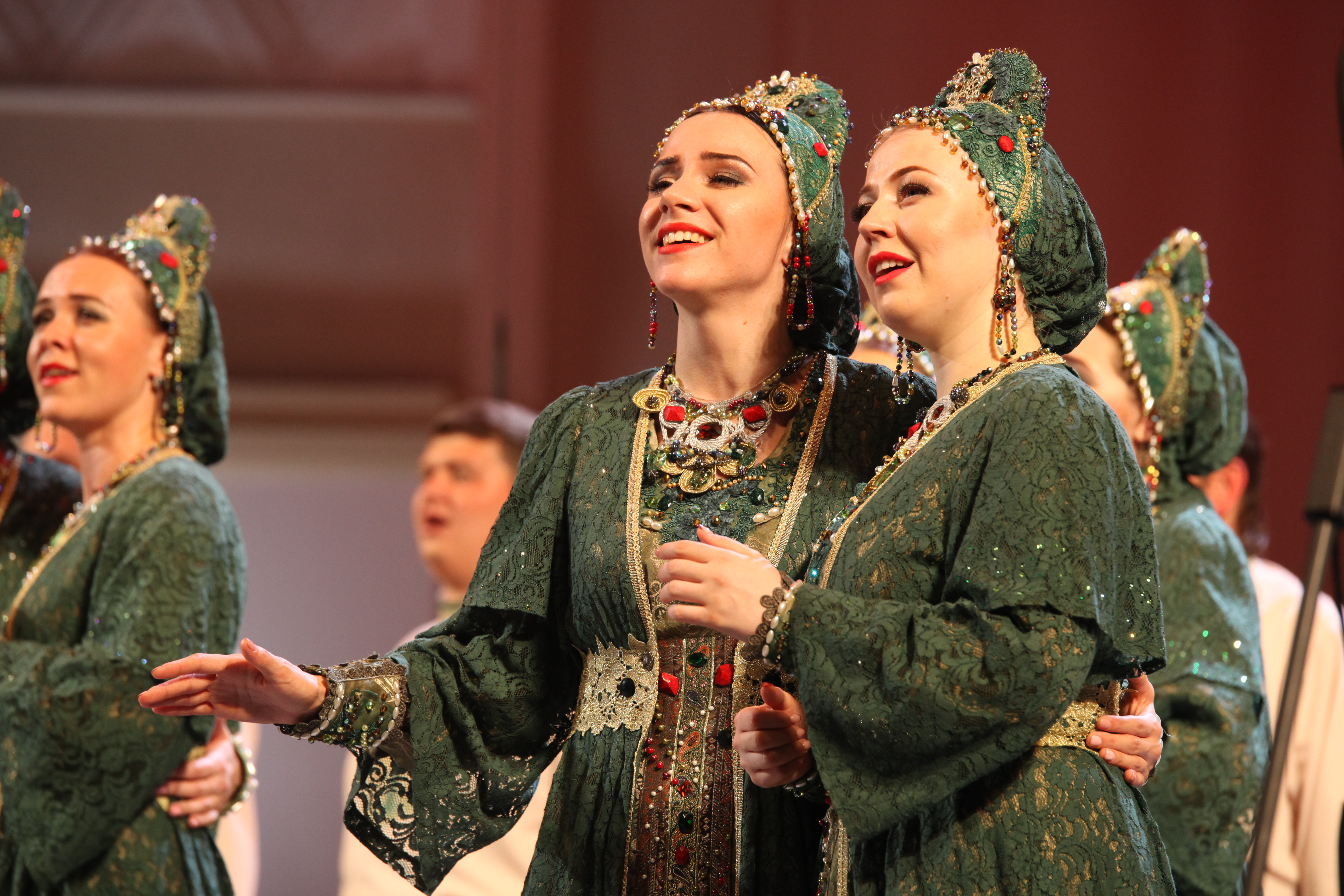 Юбилей